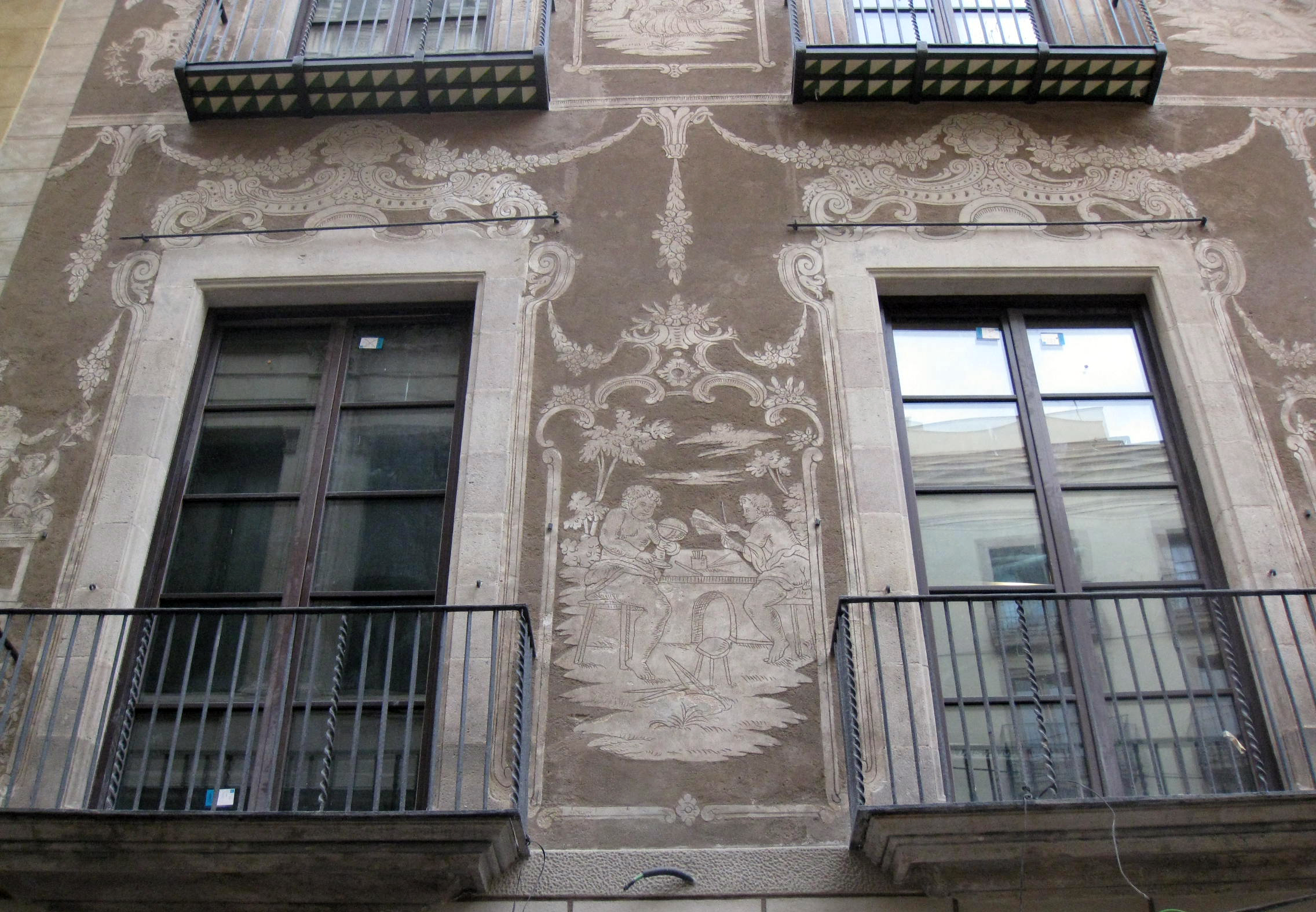 Casa dels Quatre Rius (Barcelona) Object location41° 22′ 51.13″ N, 2° 10′ 38.45″ E